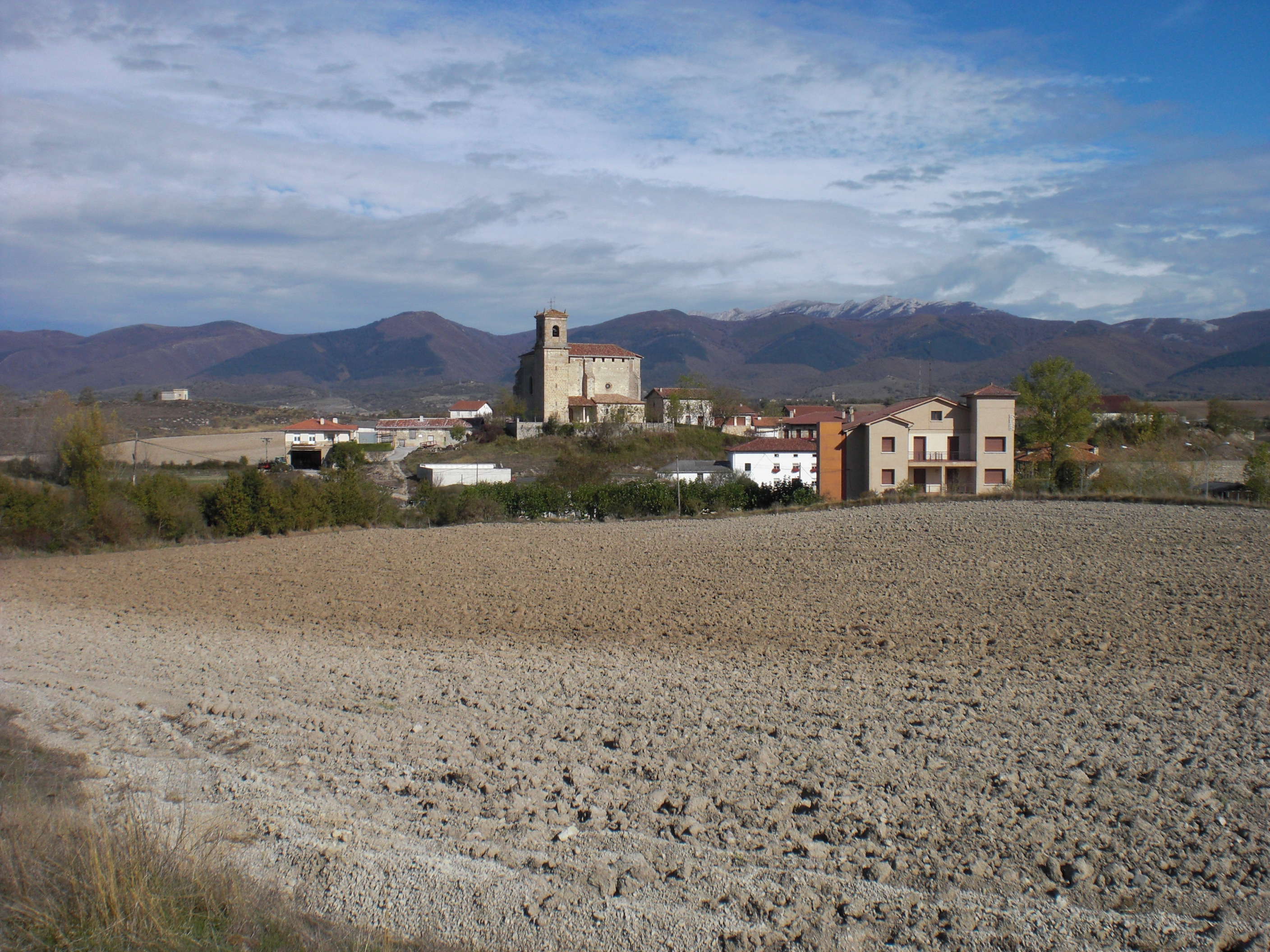 Donemiliagako Erdoñako ikuspegia. Atzean, Aizkorri.